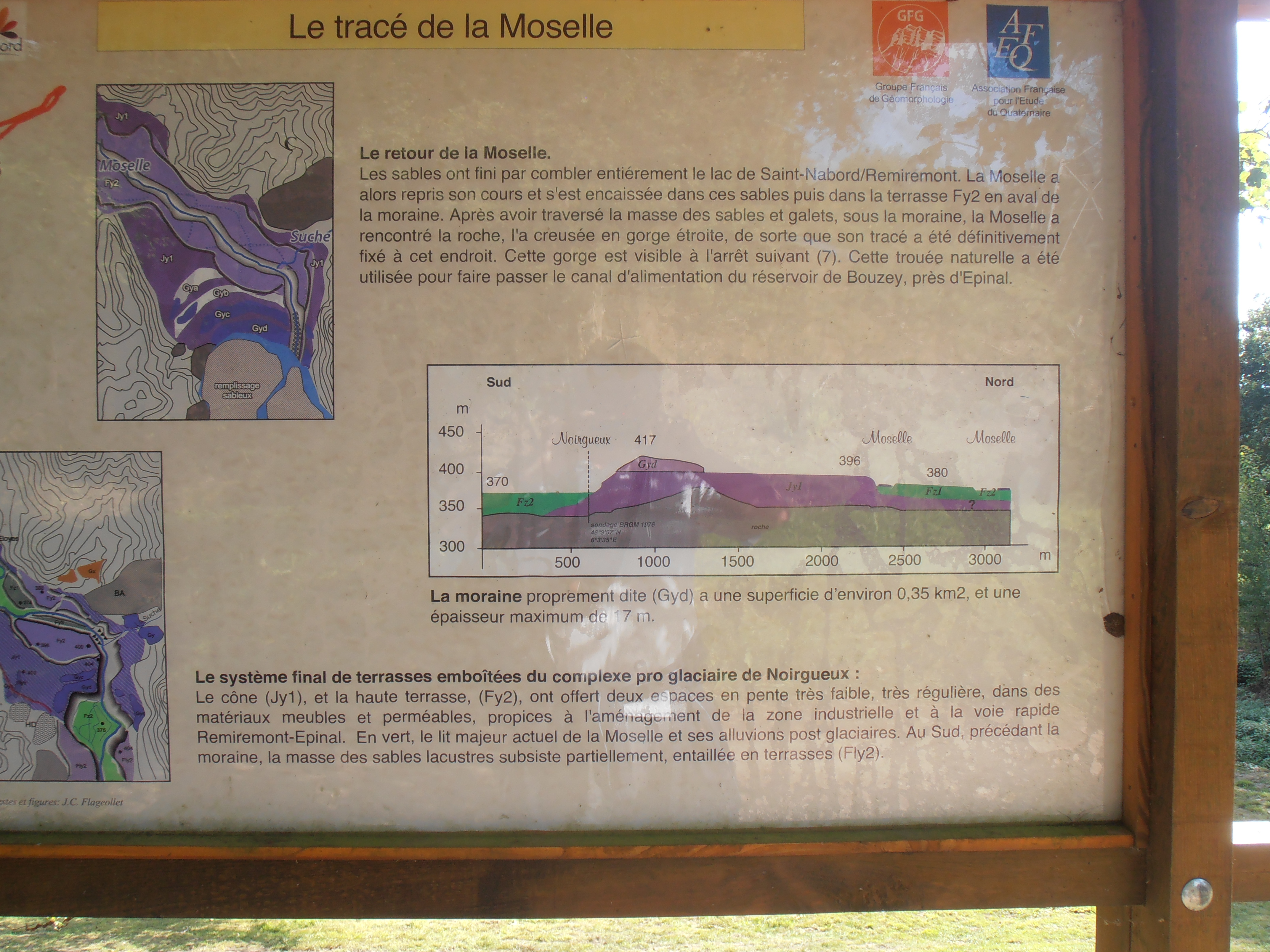 Vosges, Moraine de Noirgueux sur les communes de Saint-Nabord, Saint-Étienne-lès-Remiremont, Éloyes, Remiremont : le tracé de la Moselle